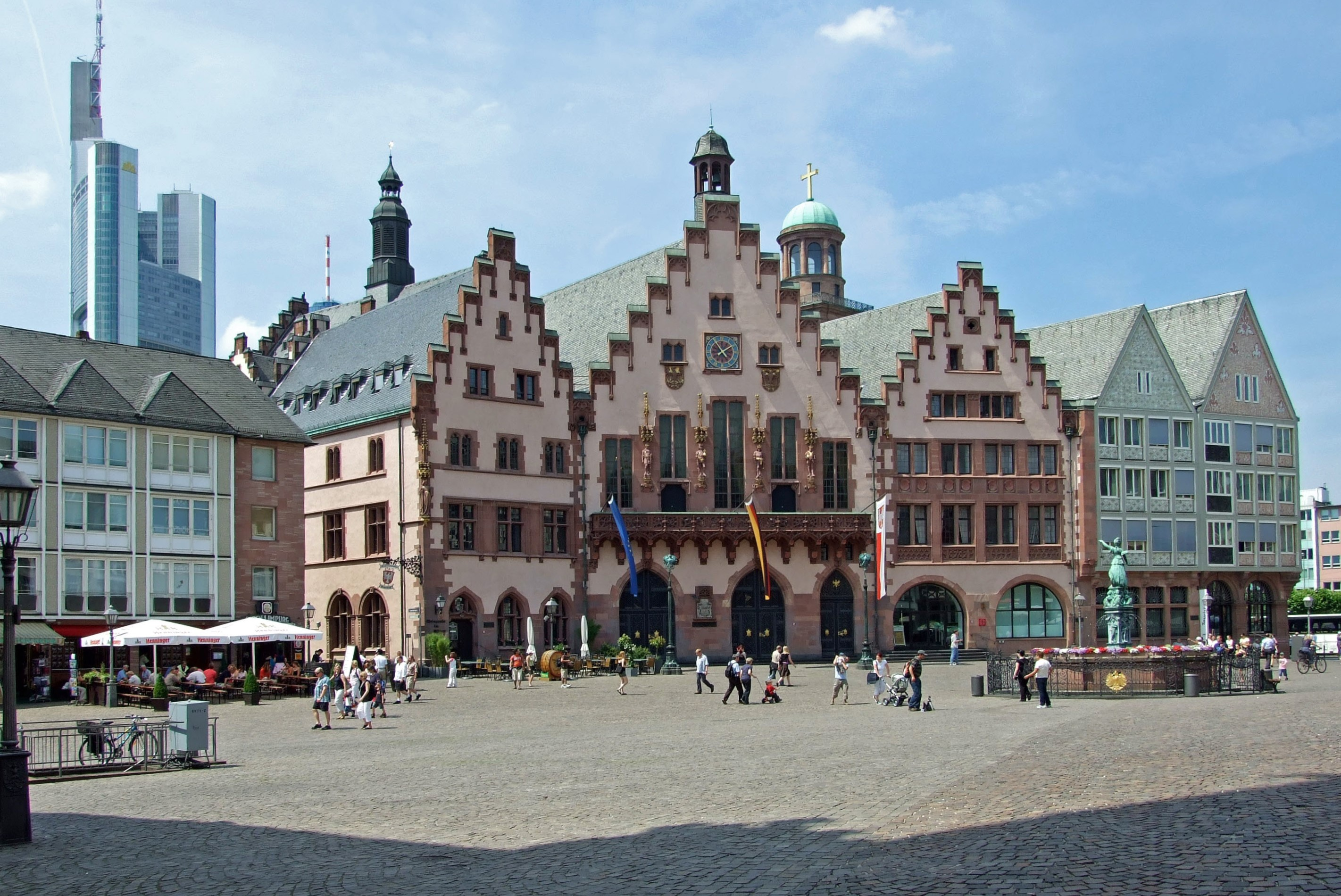 Roemerberg in Ffm